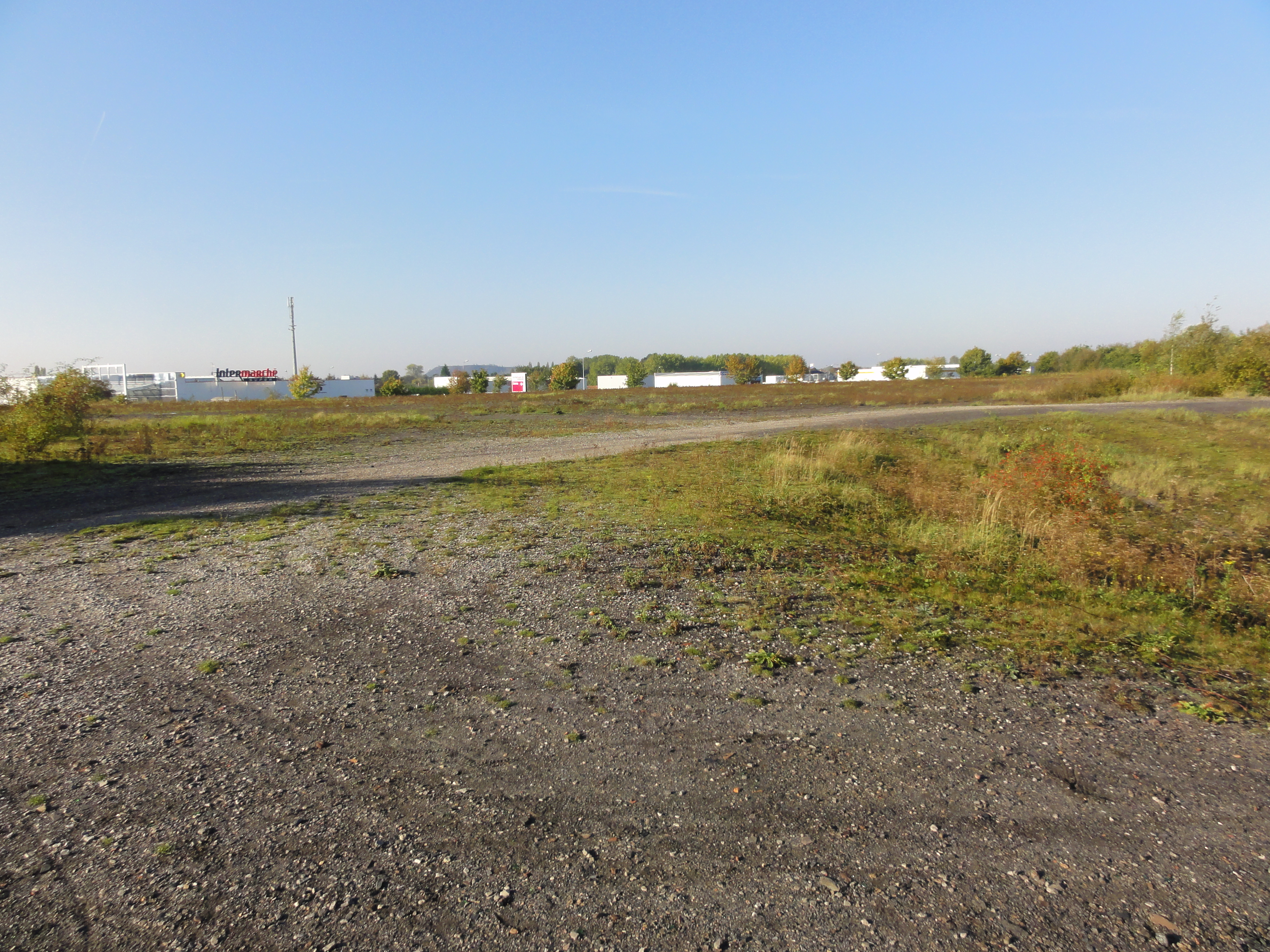 Terril n° 119 dit 6 d'Oignies Sud, Fosse n° 6 de la Compagnie des mines d'Ostricourt, Ostricourt, Nord, Nord-Pas-de-Calais, France.